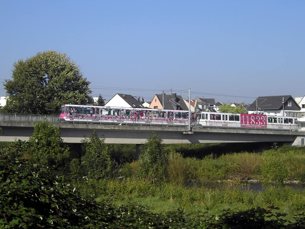 Zwei Wagen der Bonner Stadtbahn auf der Brücke über die Sieg